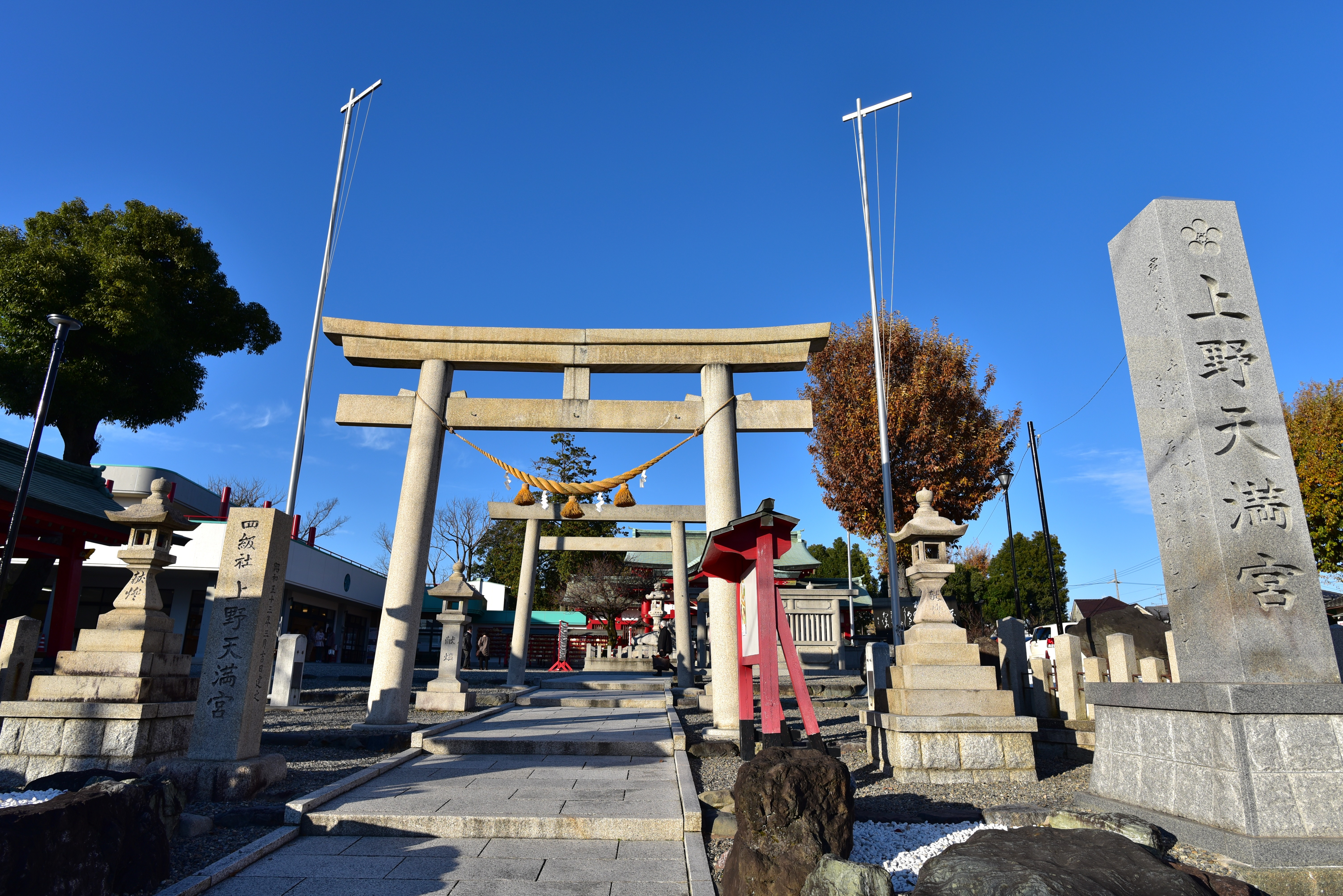 上野天満宮鳥居